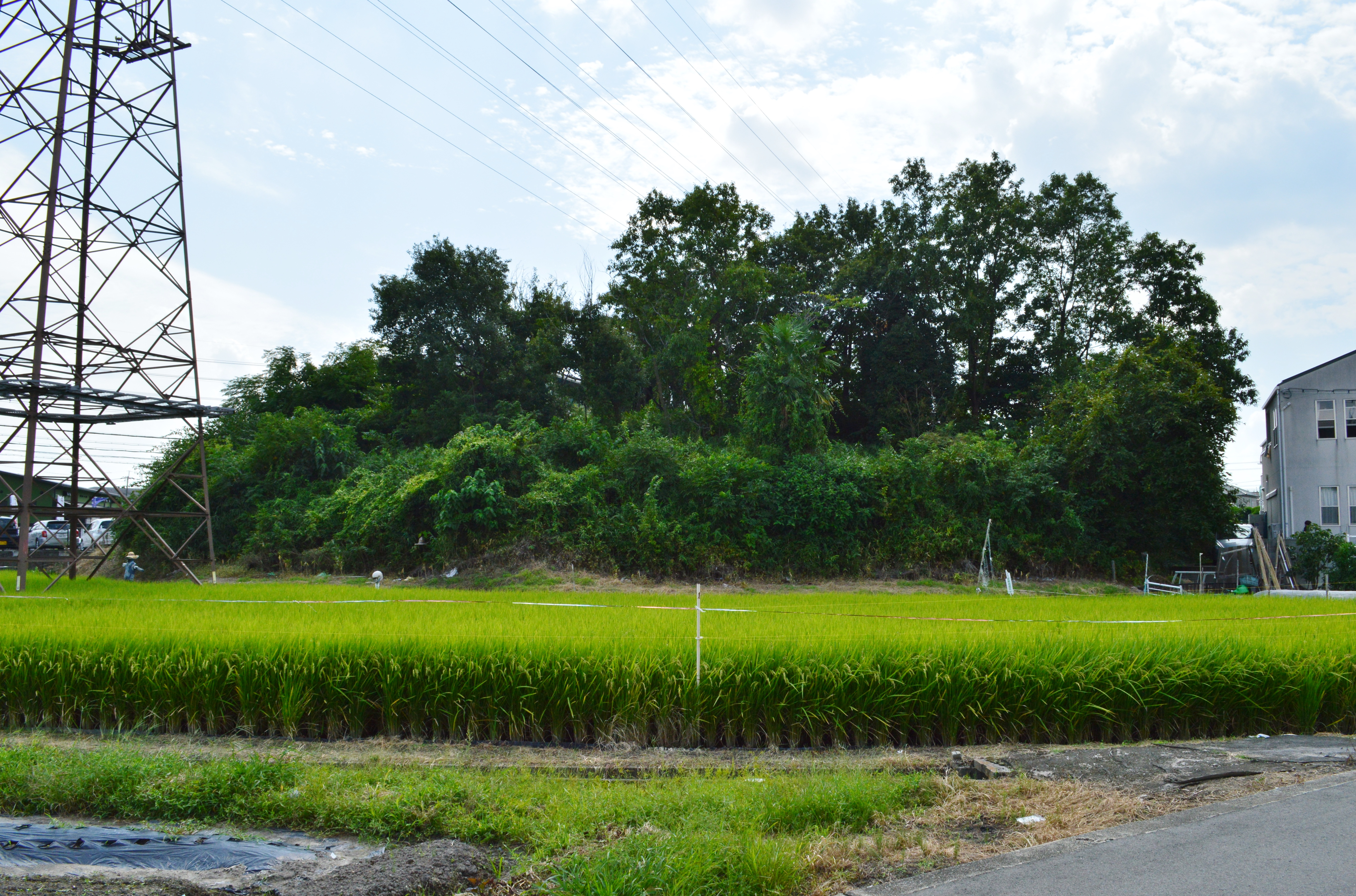 前塚古墳 (高槻市) 墳丘全景